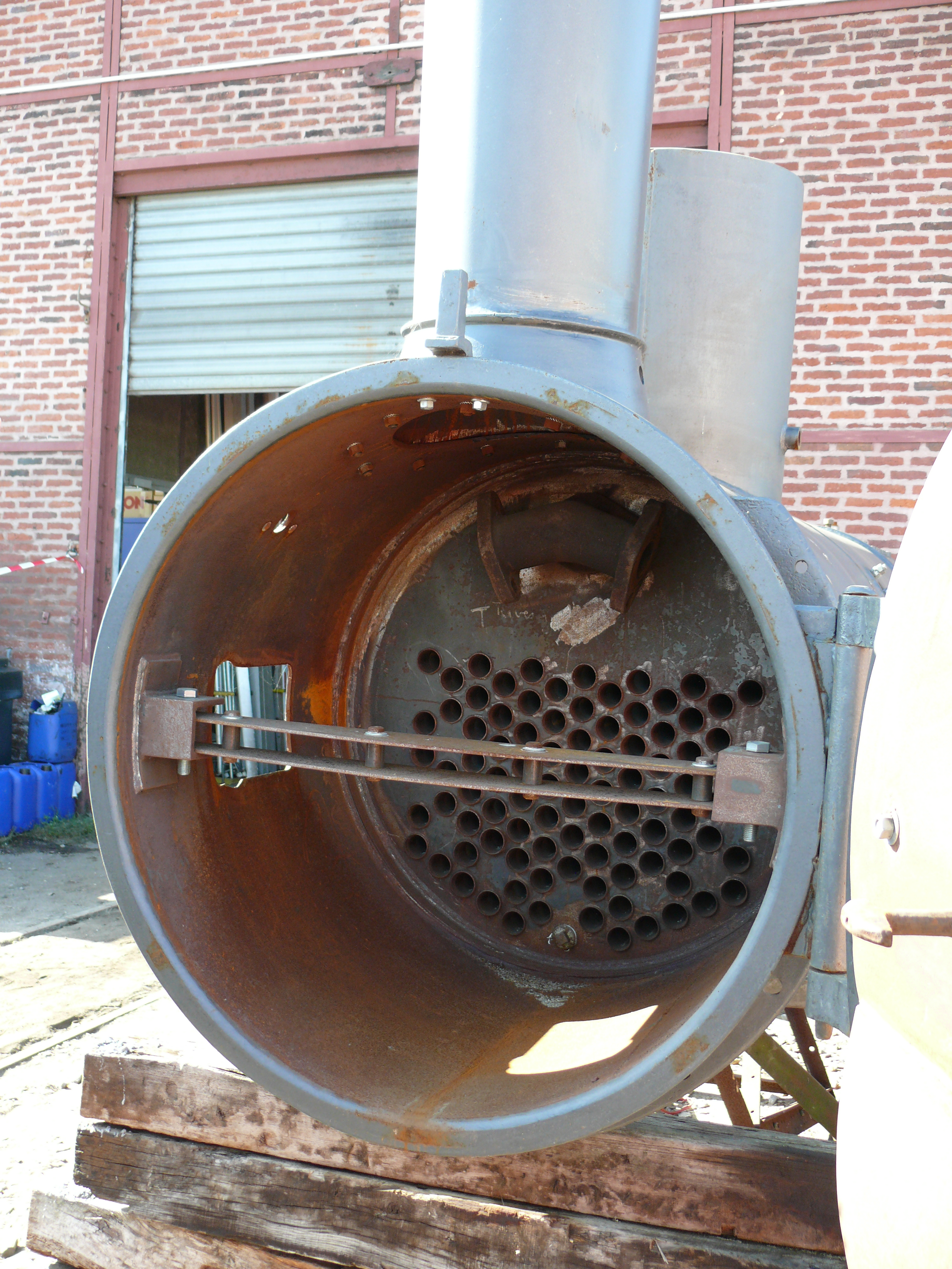 Chaudière neuve fabriquée pour la 030T Pinguely des CFBS par SECAT au Mans en 2012